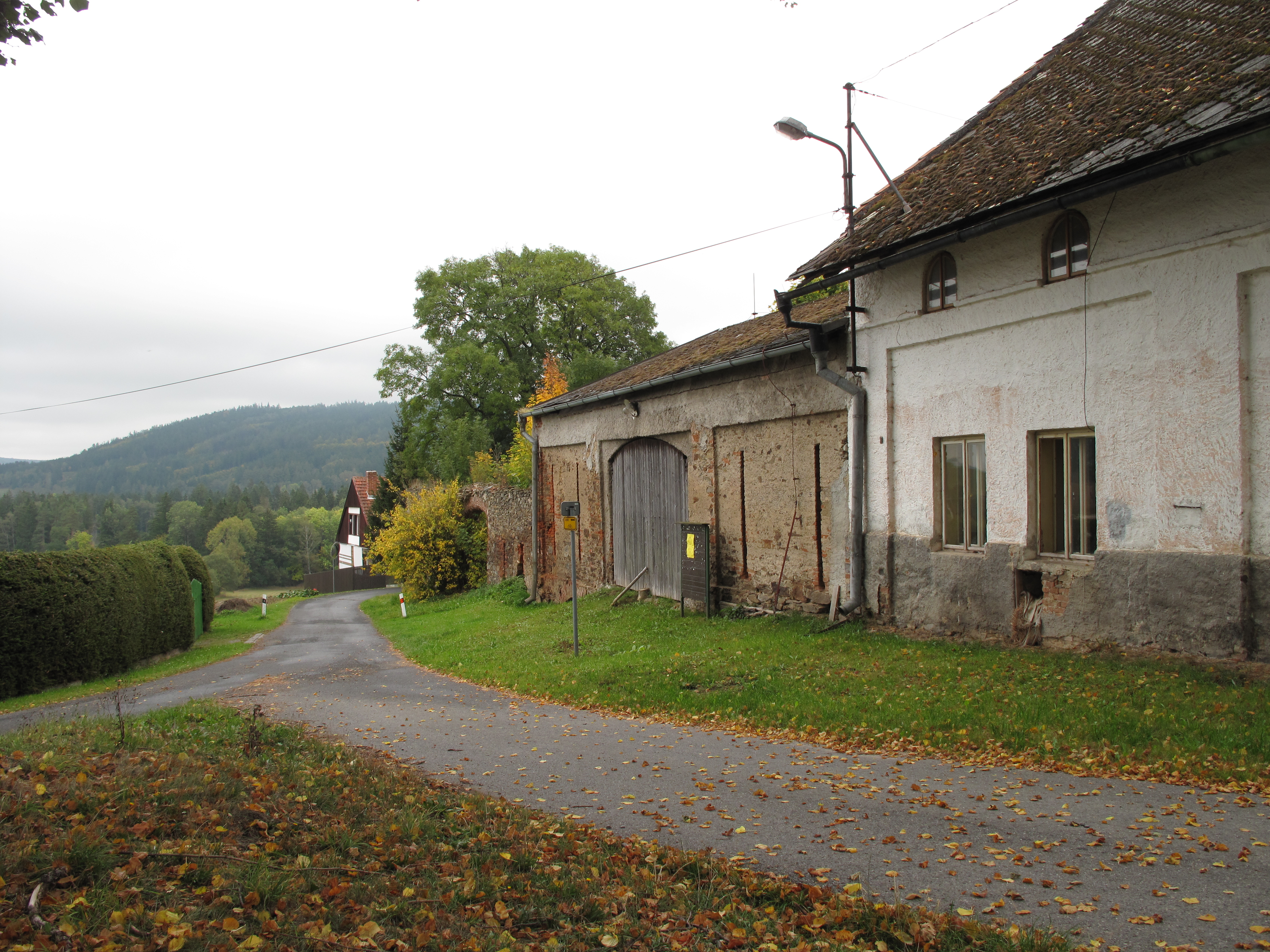 Tajanov (Kolinec). Okres Klatovy, Česká republika.